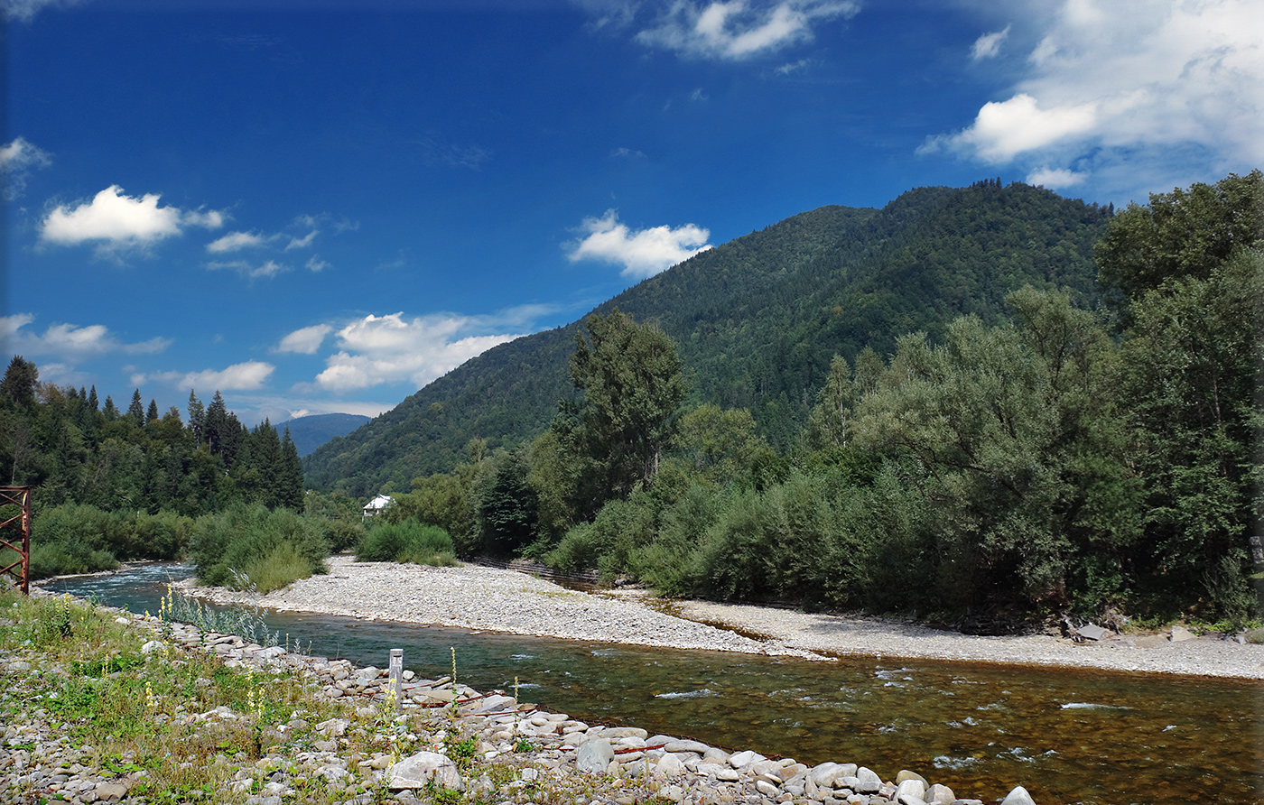 «Усть-Чорна», Тячівський р-н, ДП «Мокрянське ЛМГ», Усть-Чорнянське л-во, квартал 9, Тиховецьке л-во, квартал 12